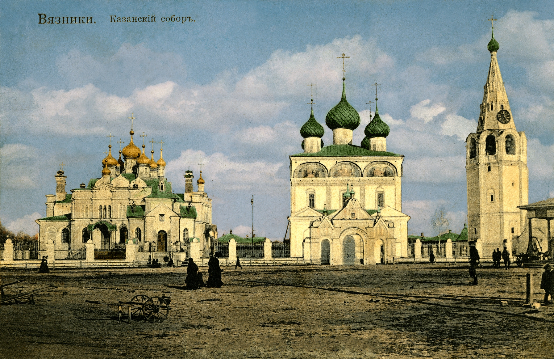 Соборная площадь в Вязниках